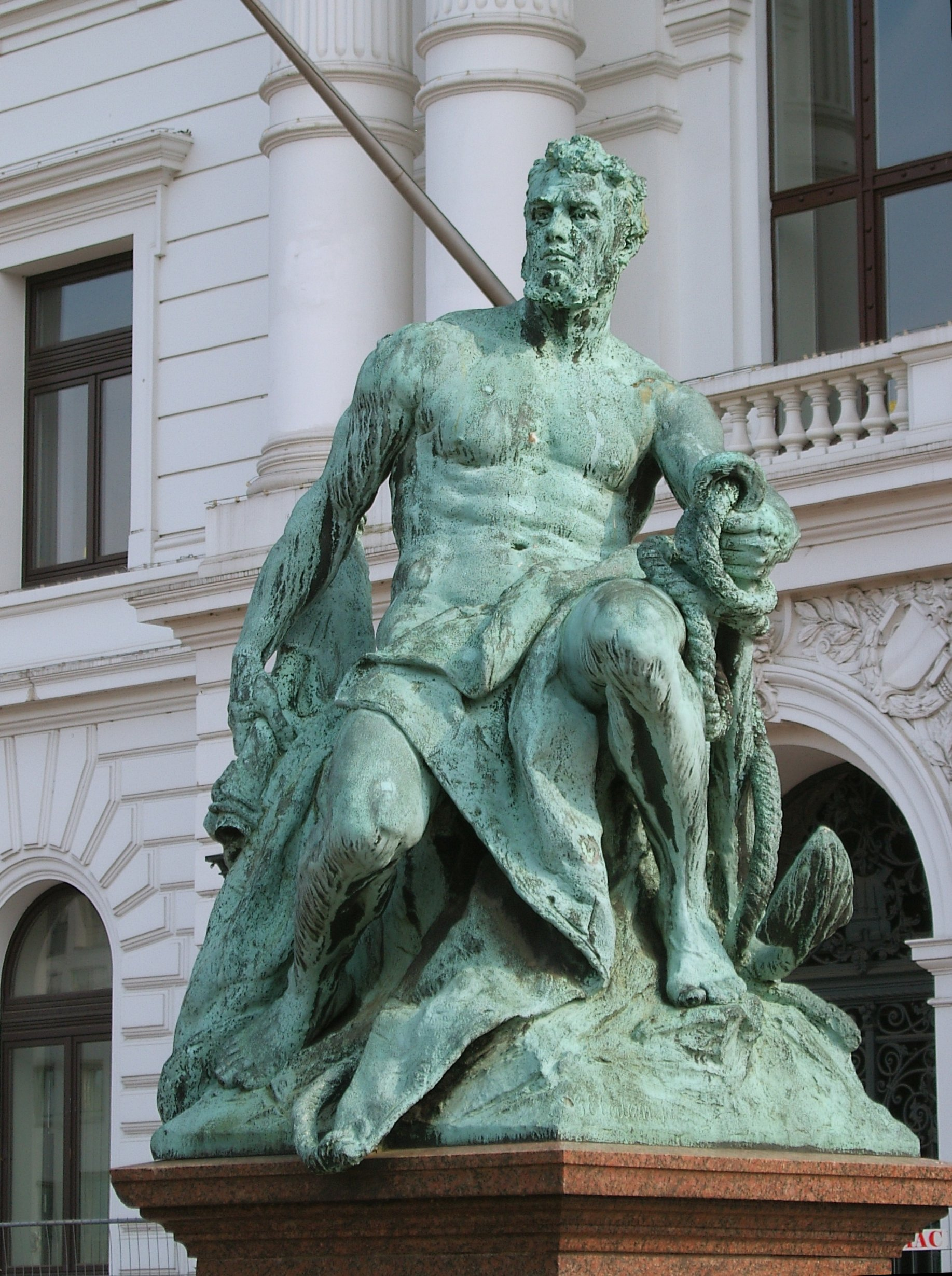 Hamburg, Altona, Rathaus, Kaiser Wilhelm-Denkmal von Gustav Eberlein. Detail